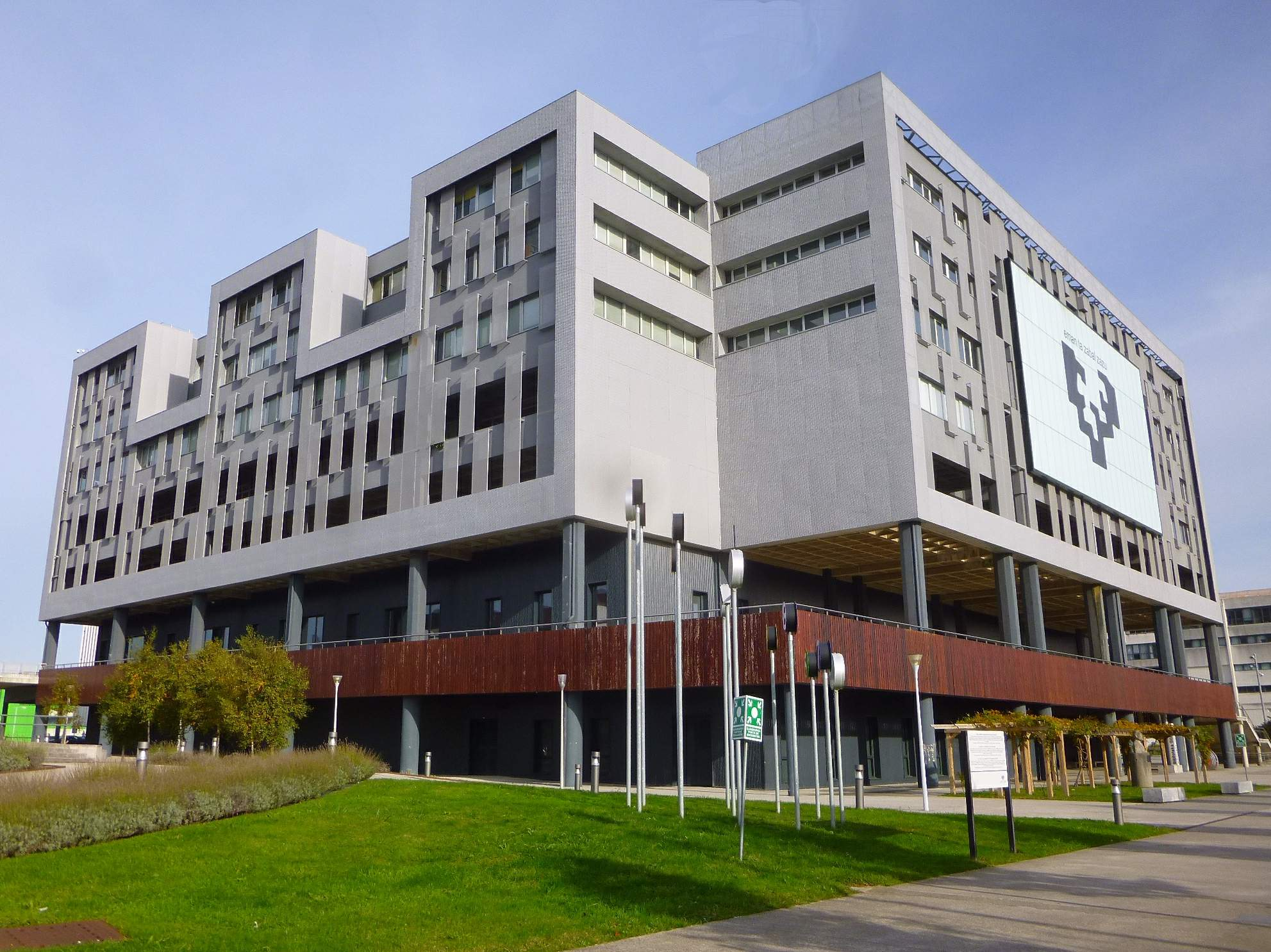 Lejona - Campus de Bizkaia de la UPV-EHU - Biblioteca Central